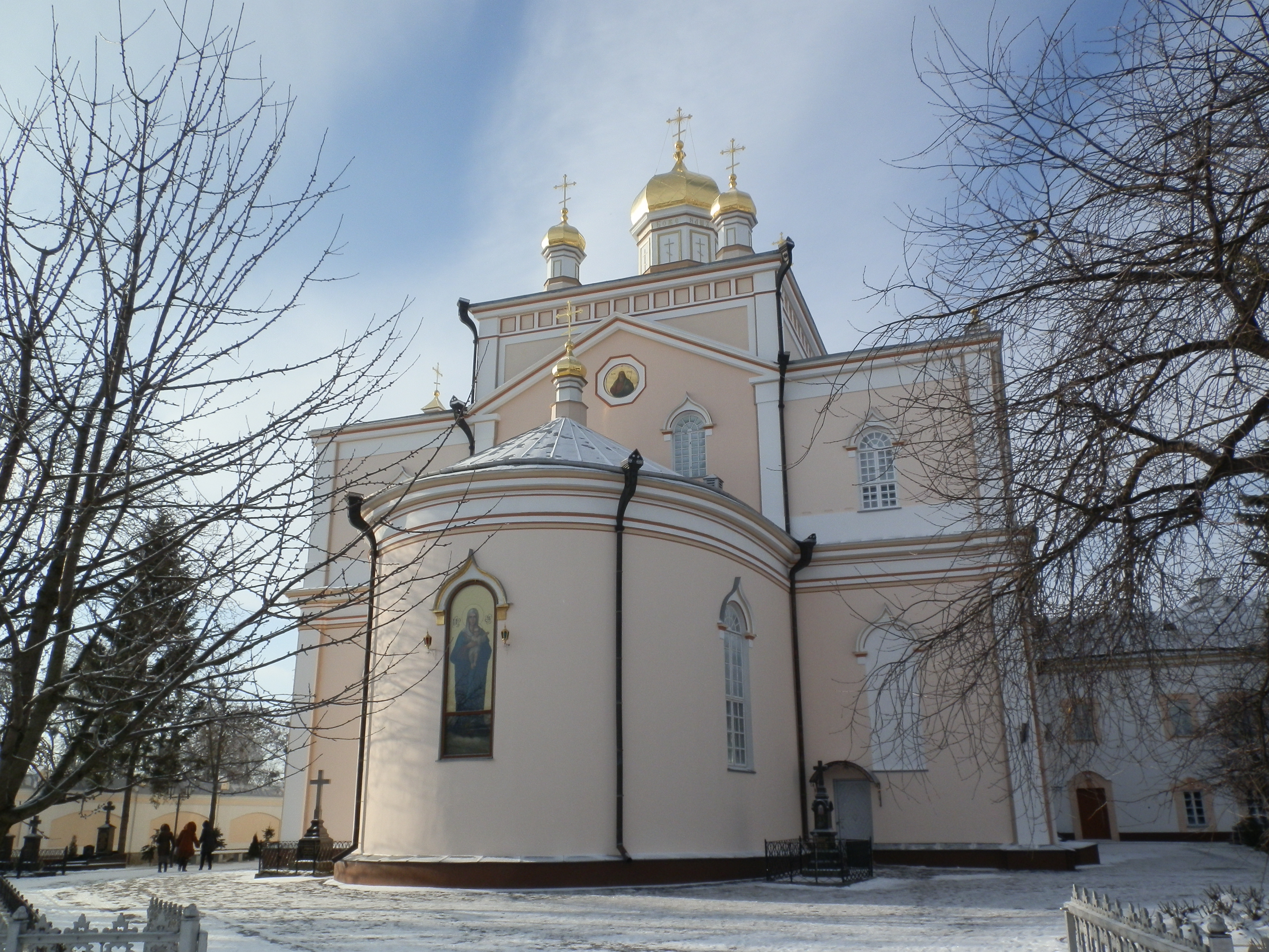 Свято-Троицкий Корецкий ставропигиальный женский монастырь